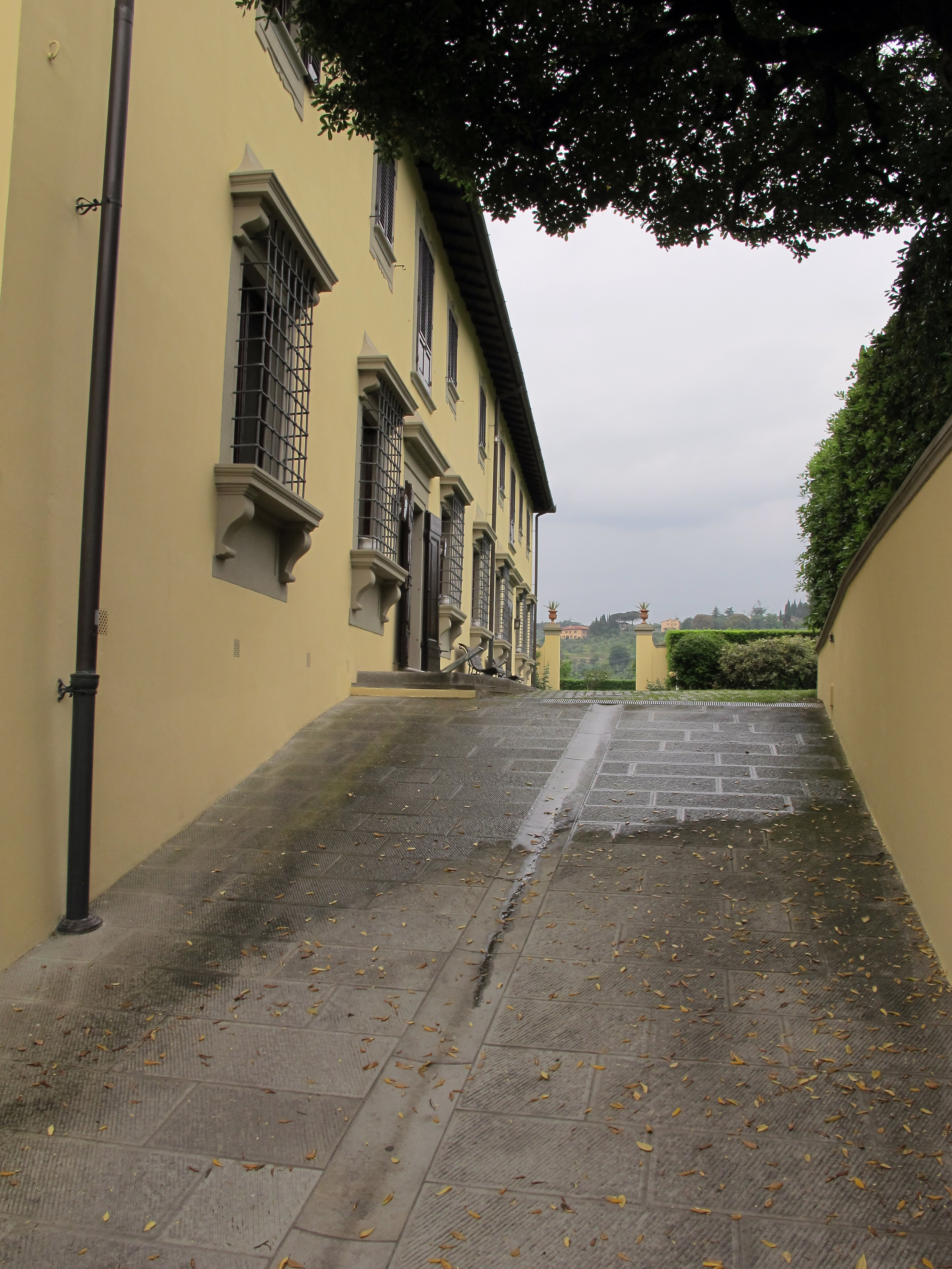 Villa il pino sulla via bolognese